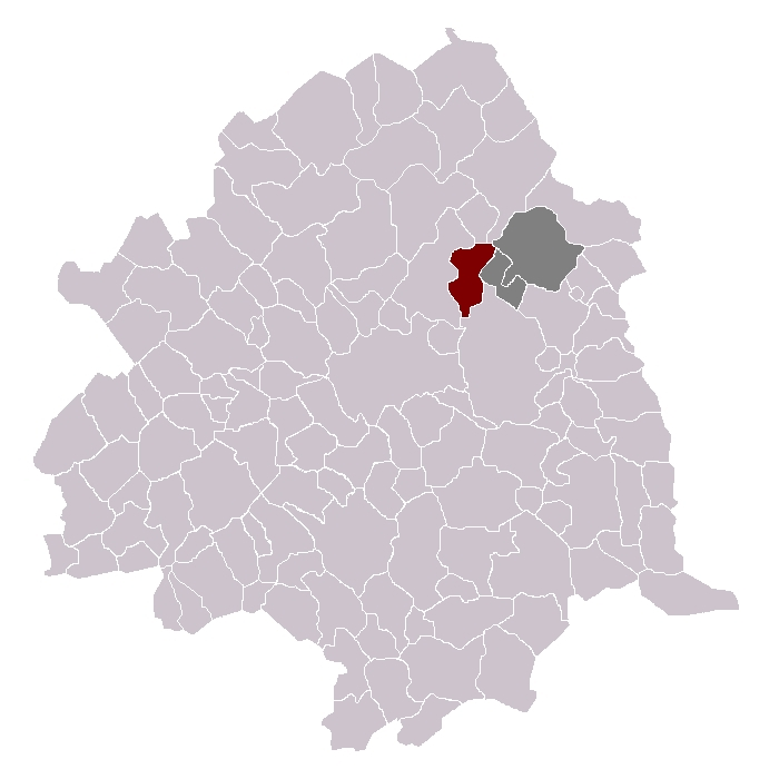 Wasquehal